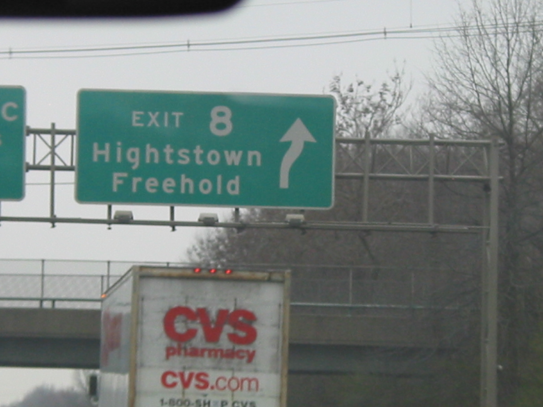 NJTP at exit 8.